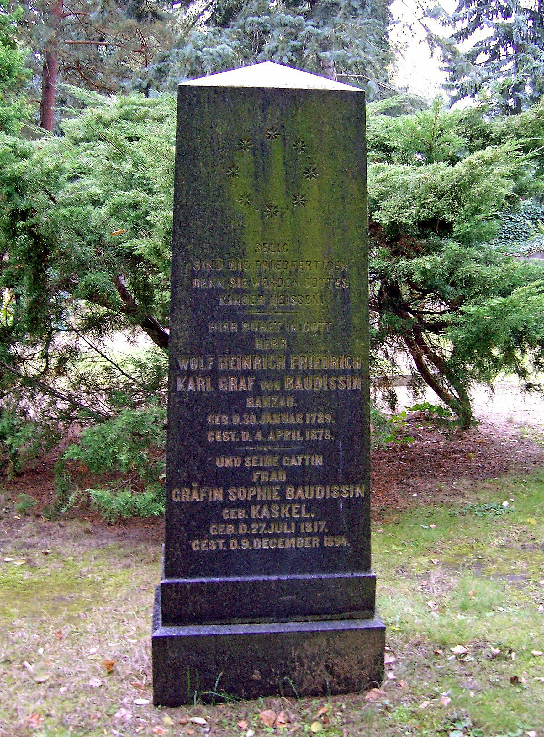 Grab des Übersetzers Wolf Heinrich Friedrich Karl Graf von Baudissin auf dem Trinitatisfriedhof in Dresden.